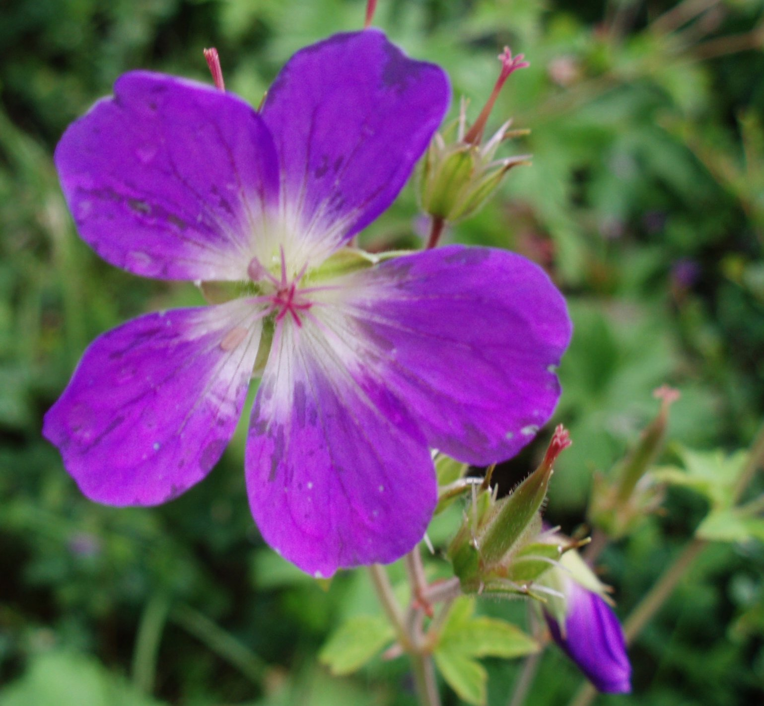 Geranium sylvaticum (de: Wald-Storchenschnabel) in Ásbyrgi in Iceland